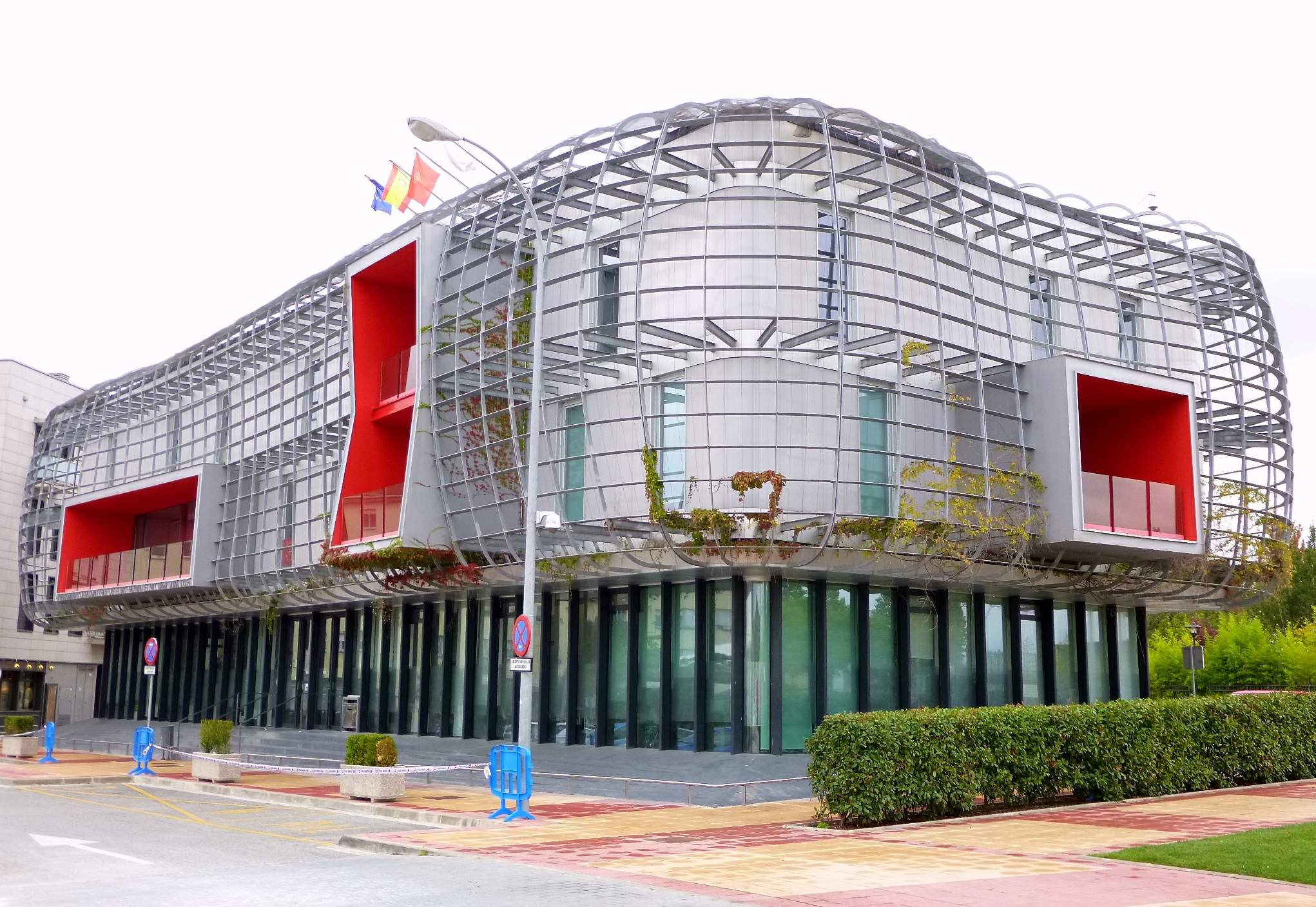 Ayuntamiento de Noáin (Navarra)